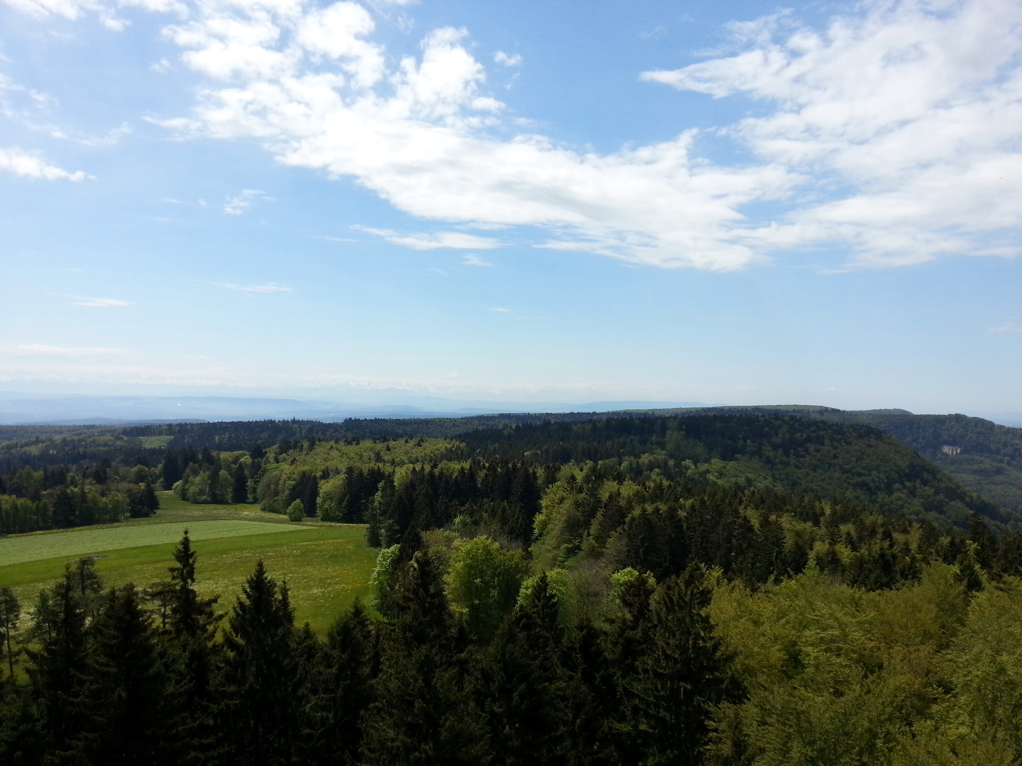 Hagenturm Aussicht Richtung Süden